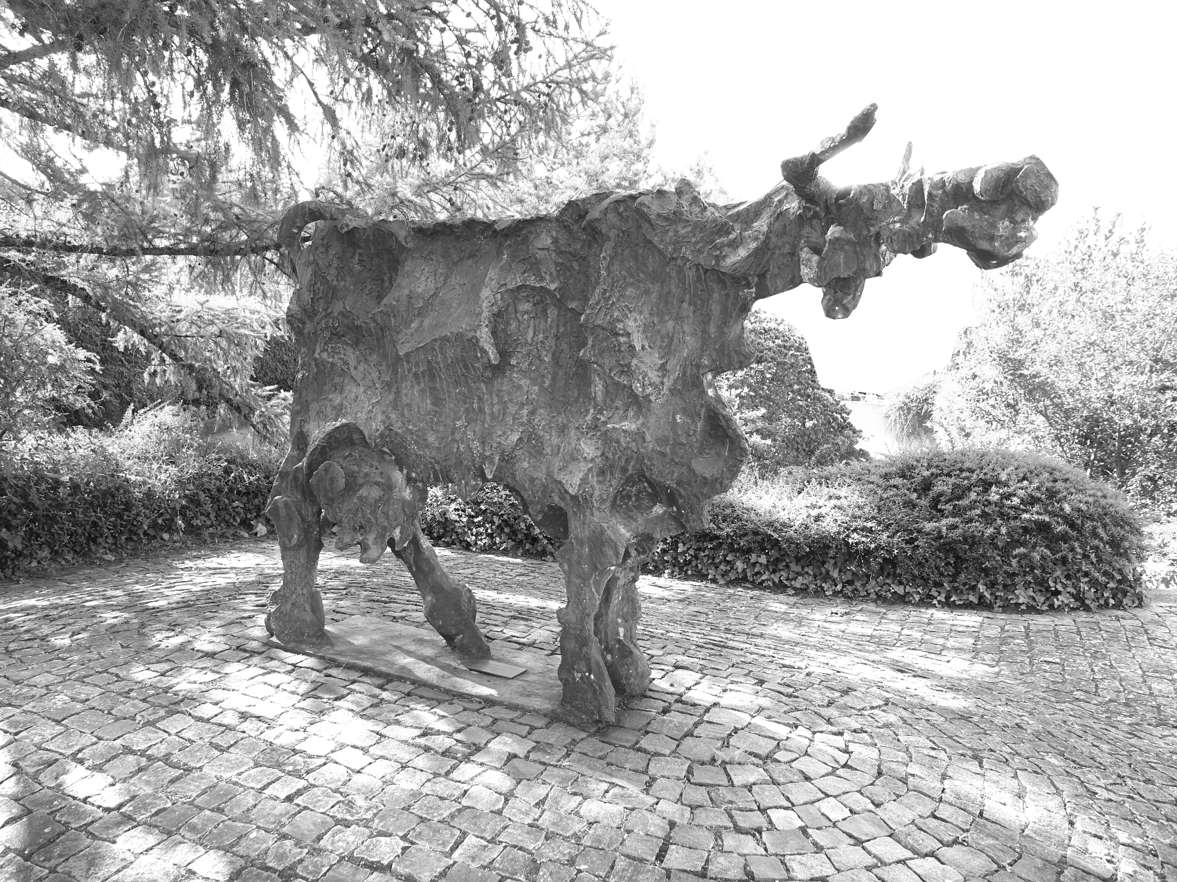 Schweiz, Riehen, Eisenbahnweg-Bahnunterführung, Kuh Skulptur, Nostalgie, 1975. Von Giuliano Pedretti (1924–2012) Bildhauer, Zeichner